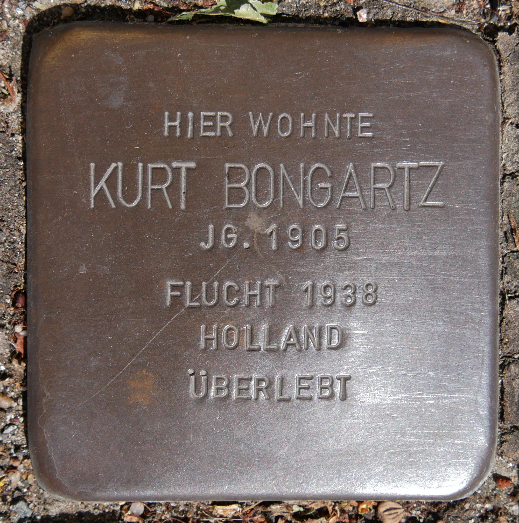 Stolpersteine Wesel: Bongartz, Kurt